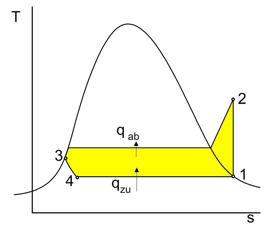 T-s-Diagramm für den Wärmepumpen-Vergleichsprozess